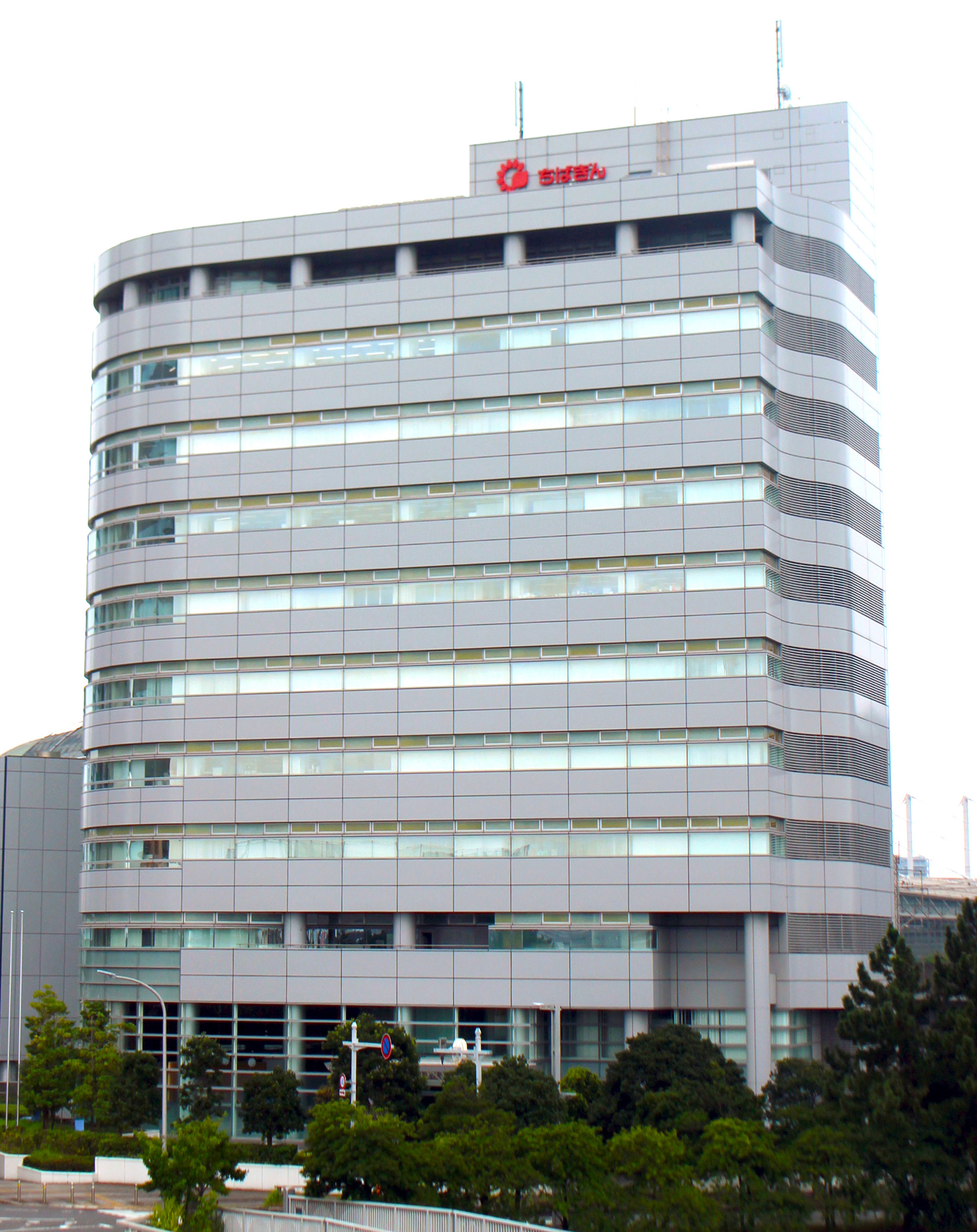 Chiba bank makuhari building